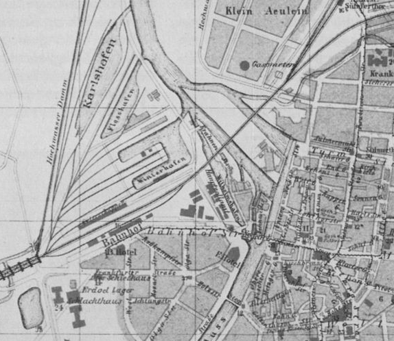 Die Häfen Heilbronns. Ausschnitt aus einem Stadtplan Heilbronns aus dem Jahr 1903